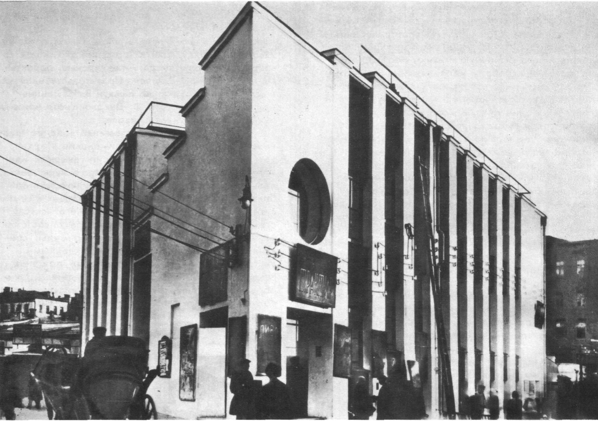 Контора Ново-Сухаревского рынка. Архитектор К.С. Мельников. Фотография 1926-1930 годов.